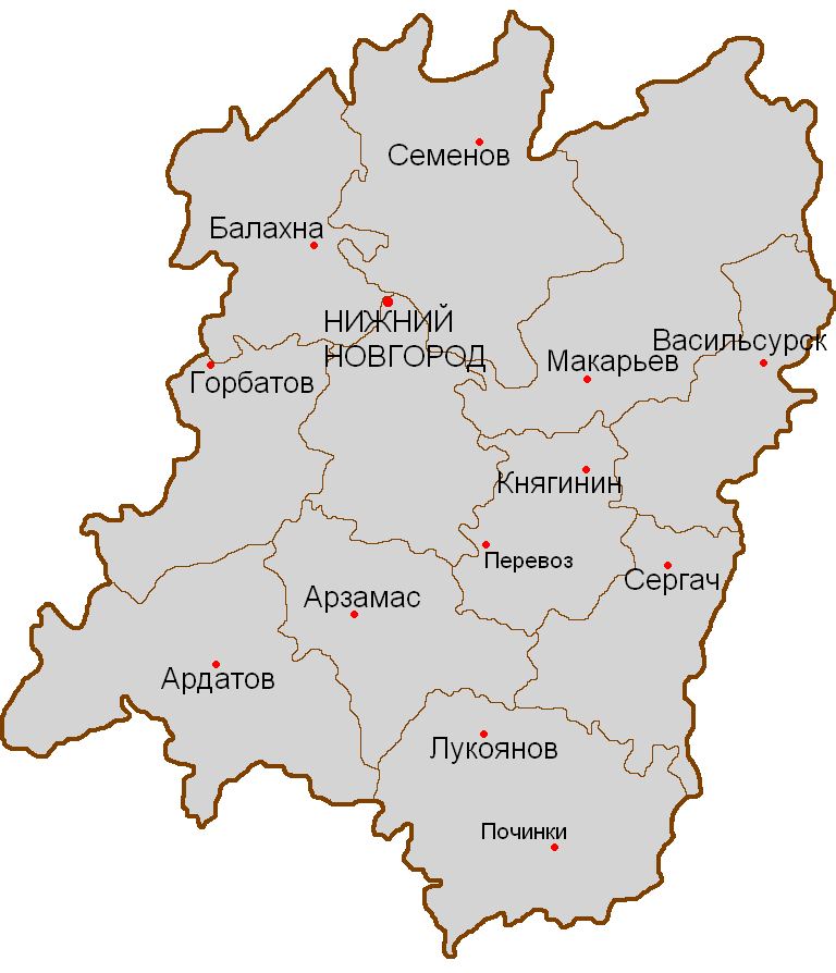 Карта административного деления Нижегородской губернии